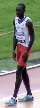 Pedro Pablo Pichardo Paavo Nurmen kisoissa, Paavo Nurmen stadionilla, Turussa, 16. kesäkuuta 2013